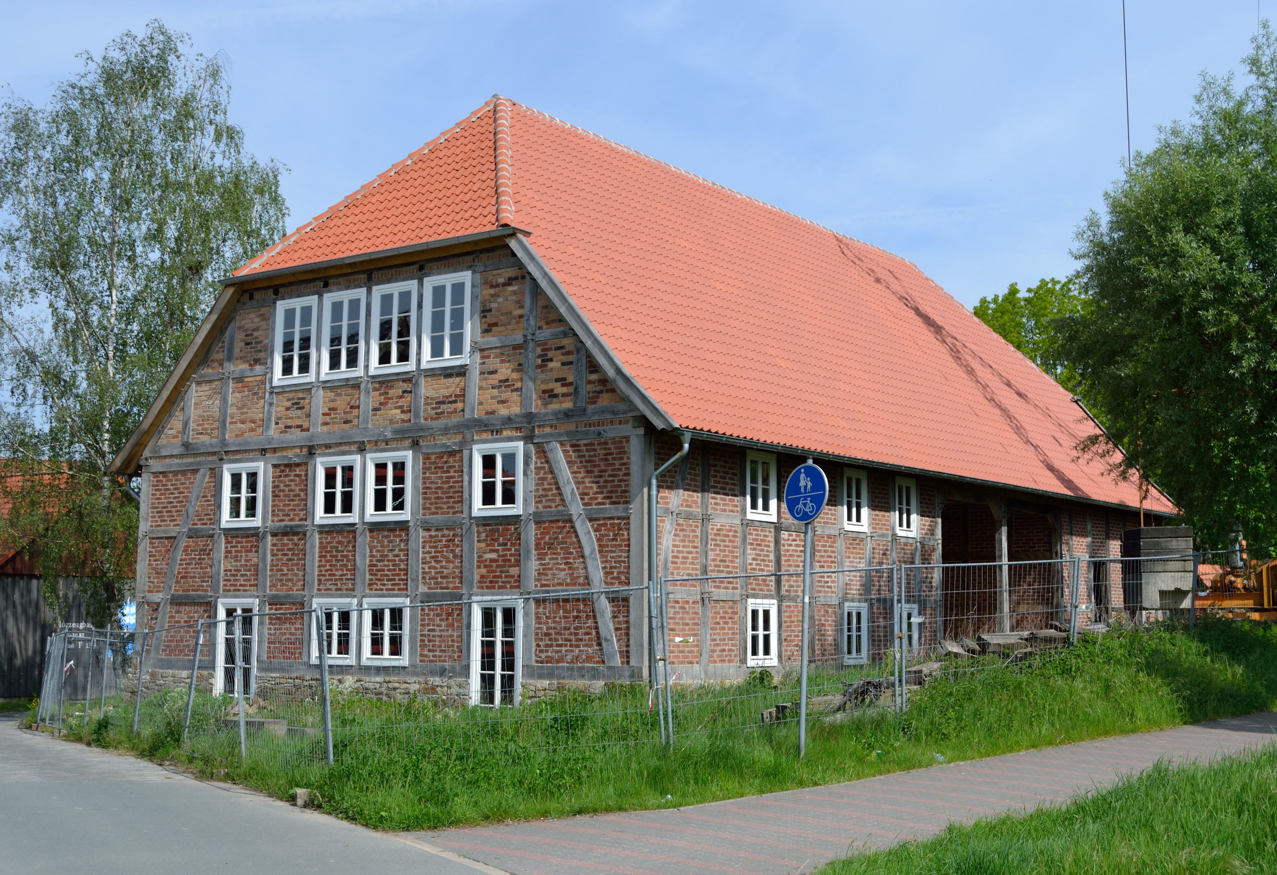 Gut Herberhausen, Objekt 2: Torhaus This is a photograph of an architectural monument.